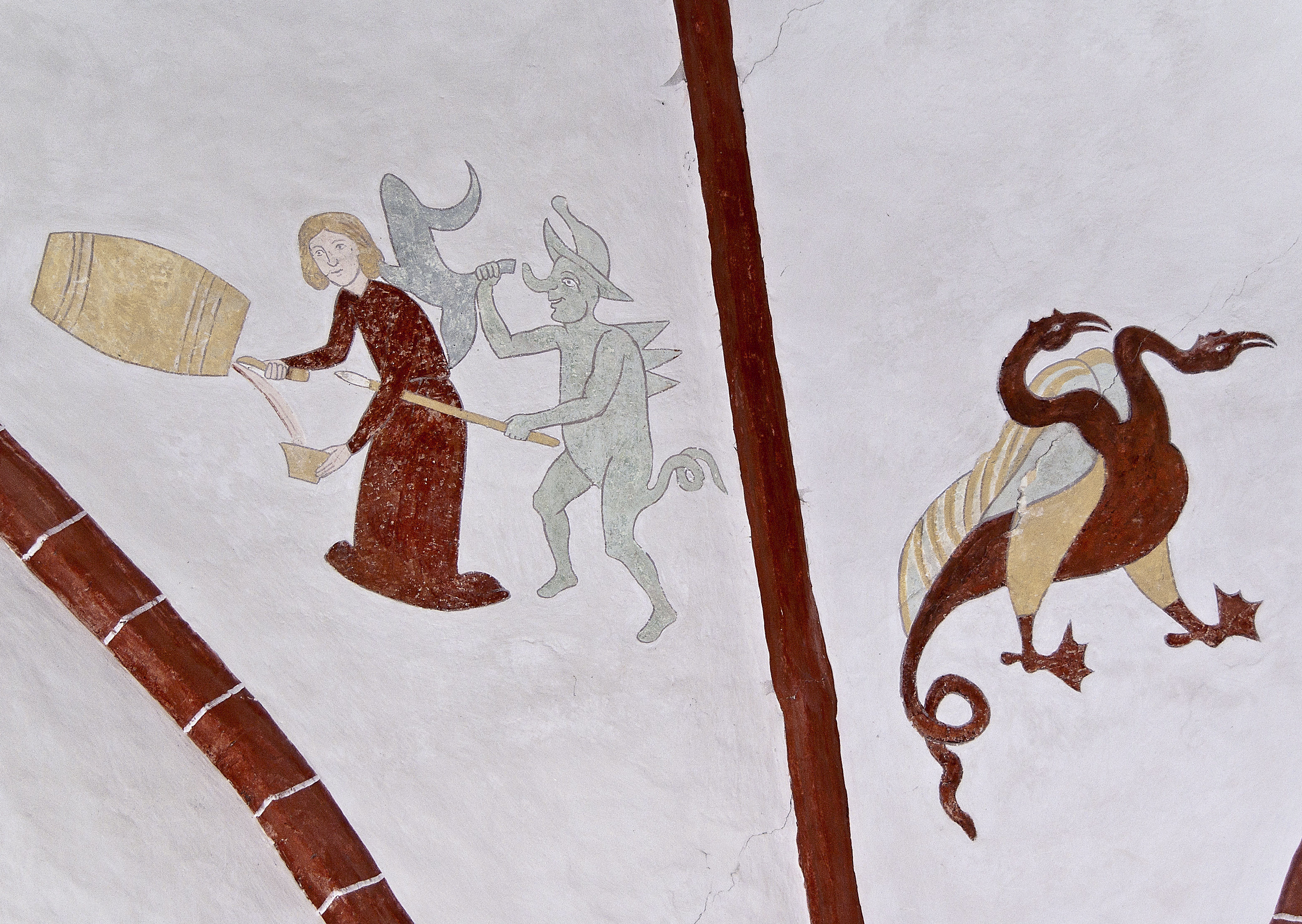 Dorfkirche Bernitt - Zwickelmalereien im Schiff